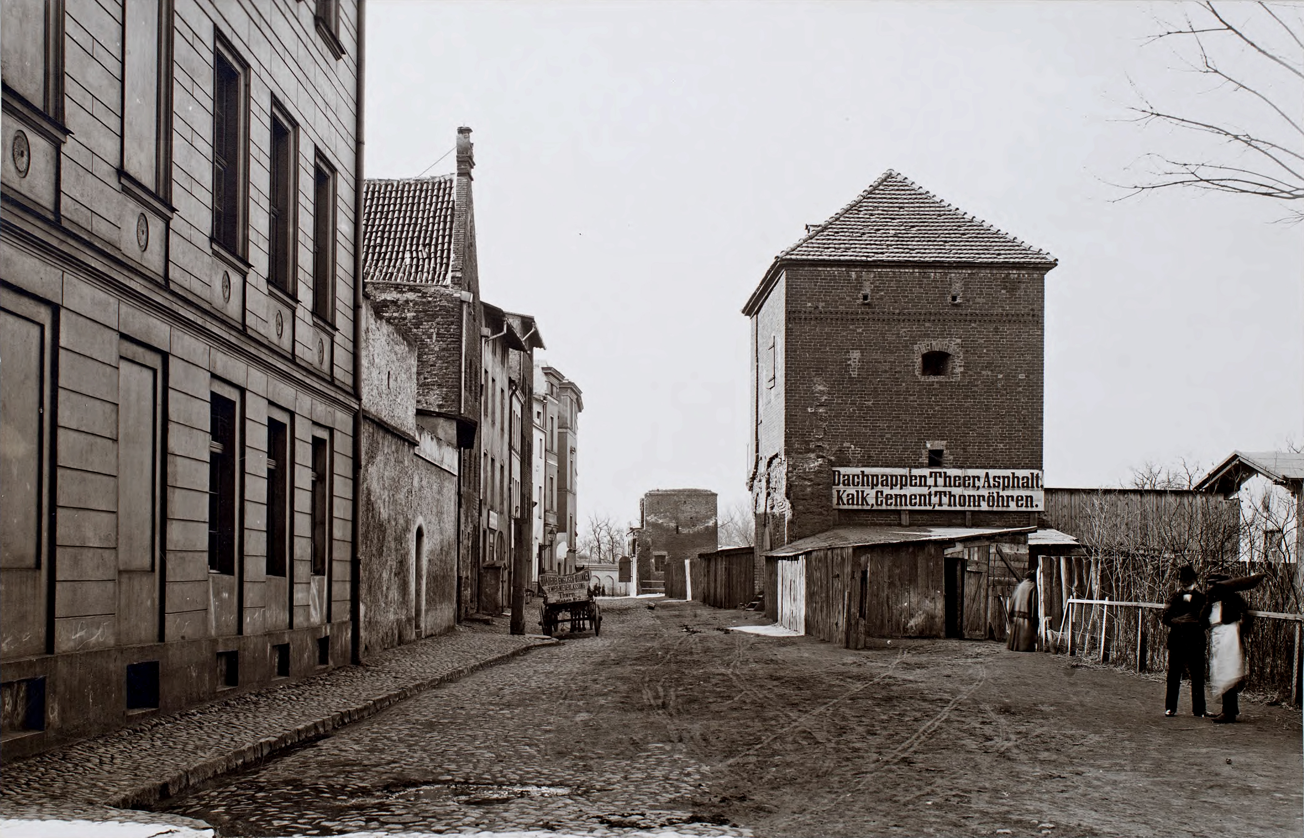 Widok na obecną ulicę Fosa Staromiejska w Toruniu. Widoczne nieistniejące już baszty nr 25 i w głębi 27 (numeracja wg. Jerzego Stankiewicza)